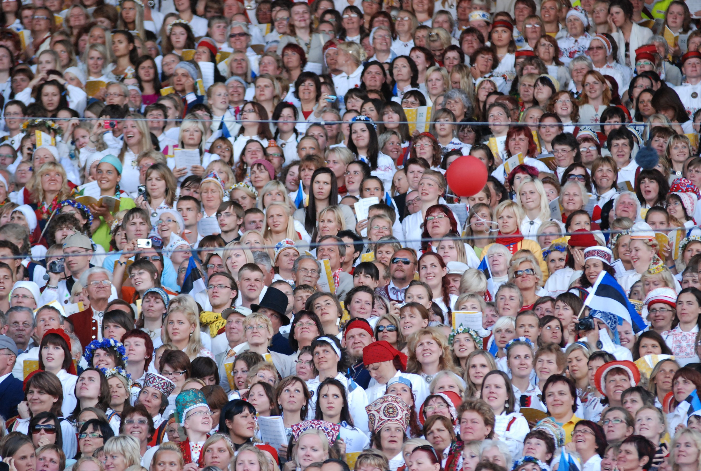 中文（台灣）: 音樂歌舞節